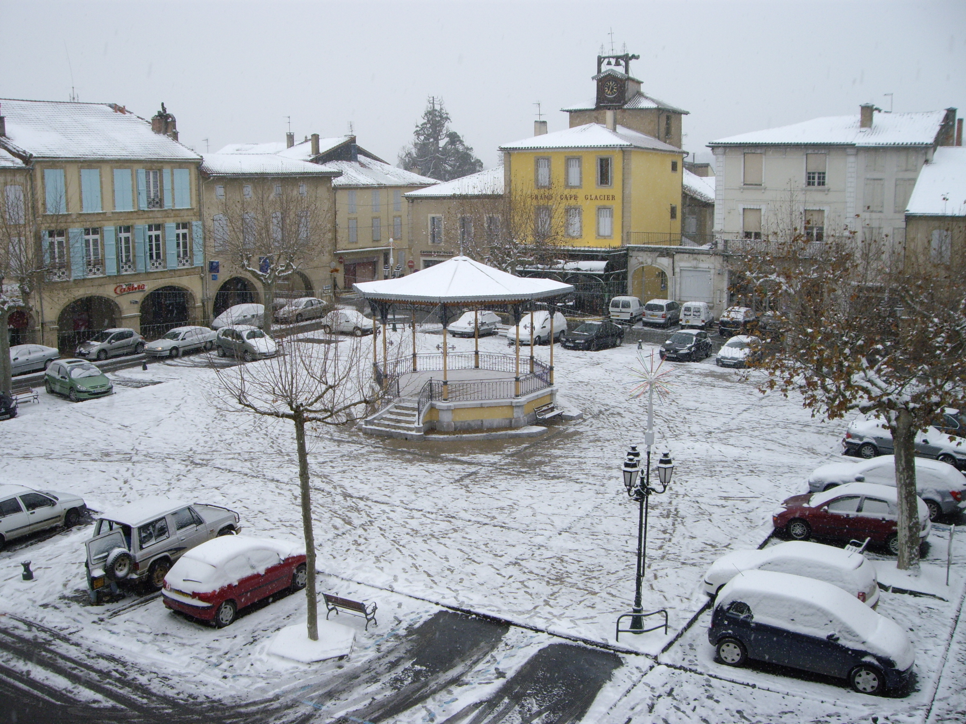 La place d'Astarac sous la neige (Mirande, Gers, France).